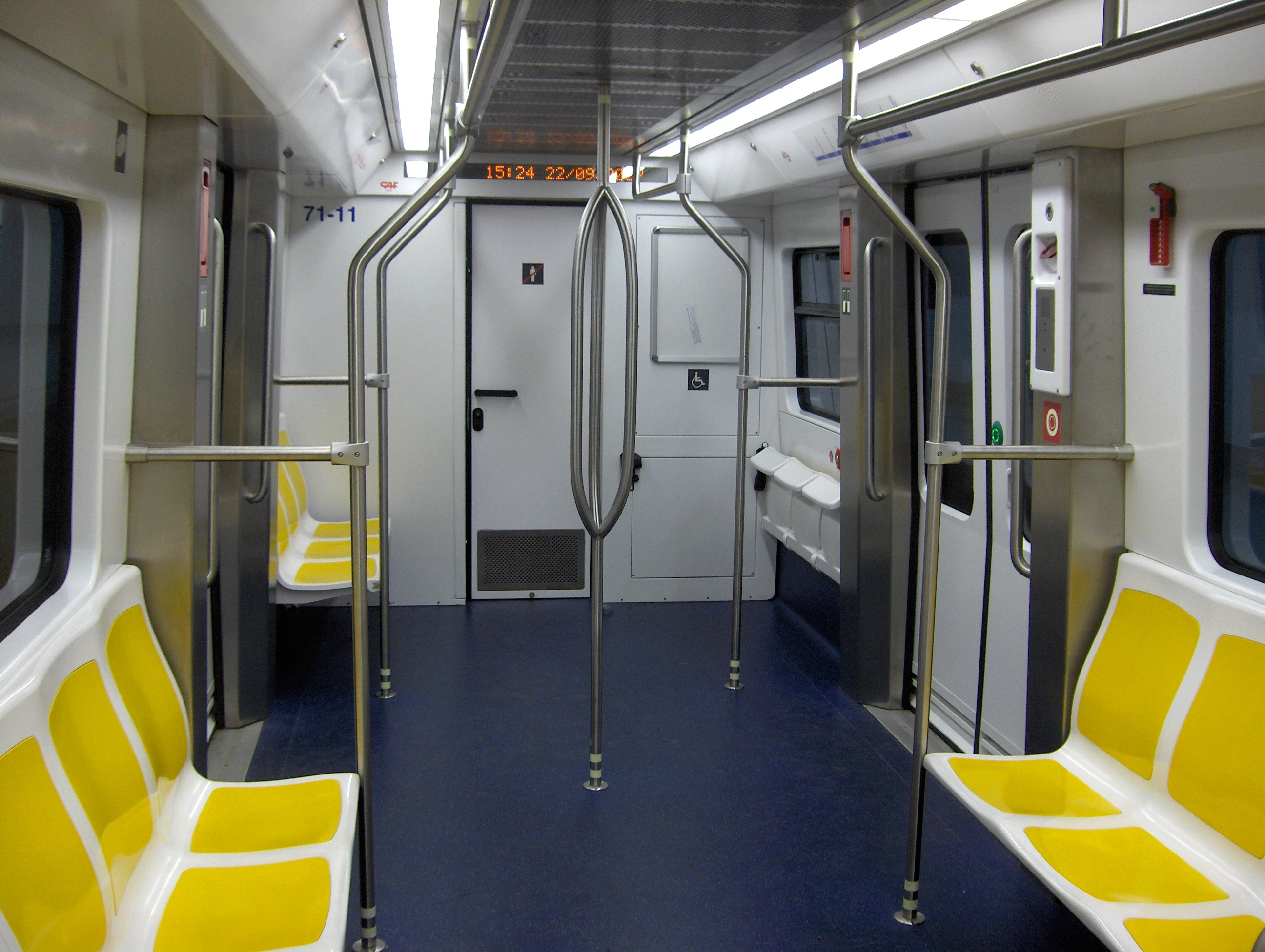 Interior of a Metro de Palma unit